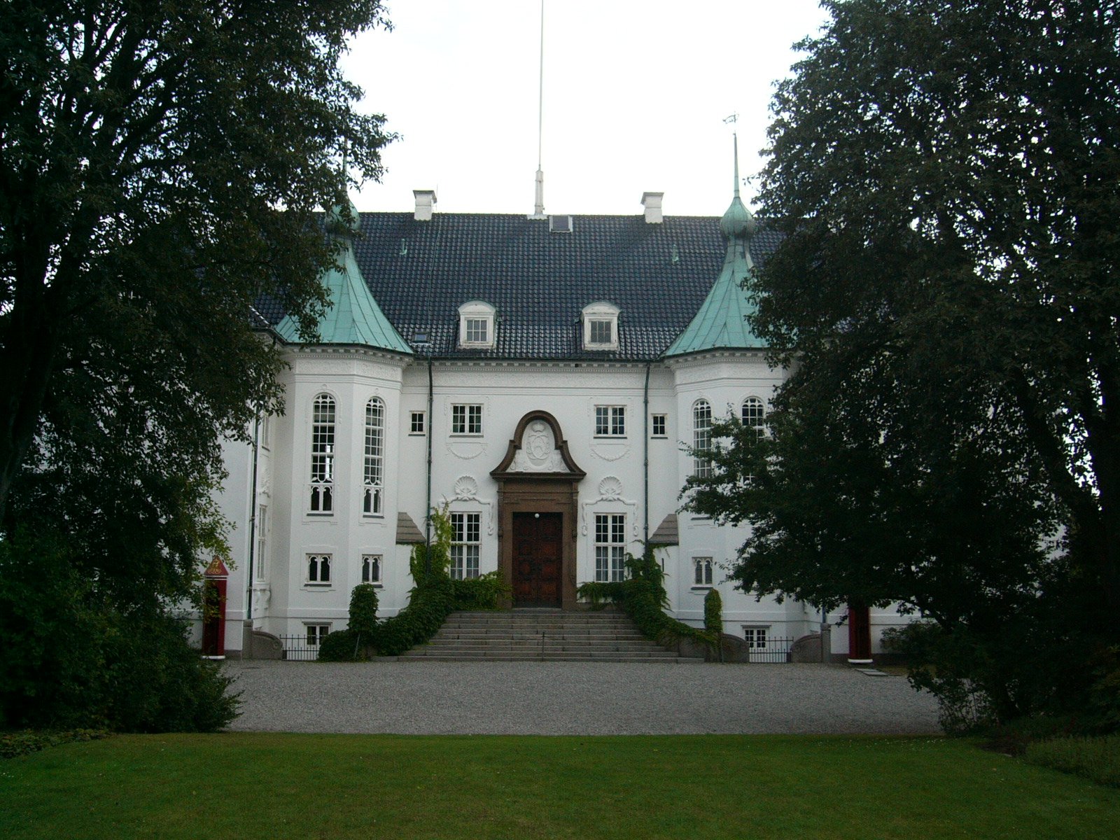 Marselisborg Slot, by myself.